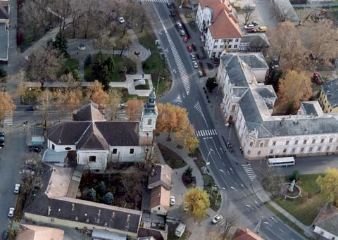 Kiskőrös, Hungary, aerialphotography